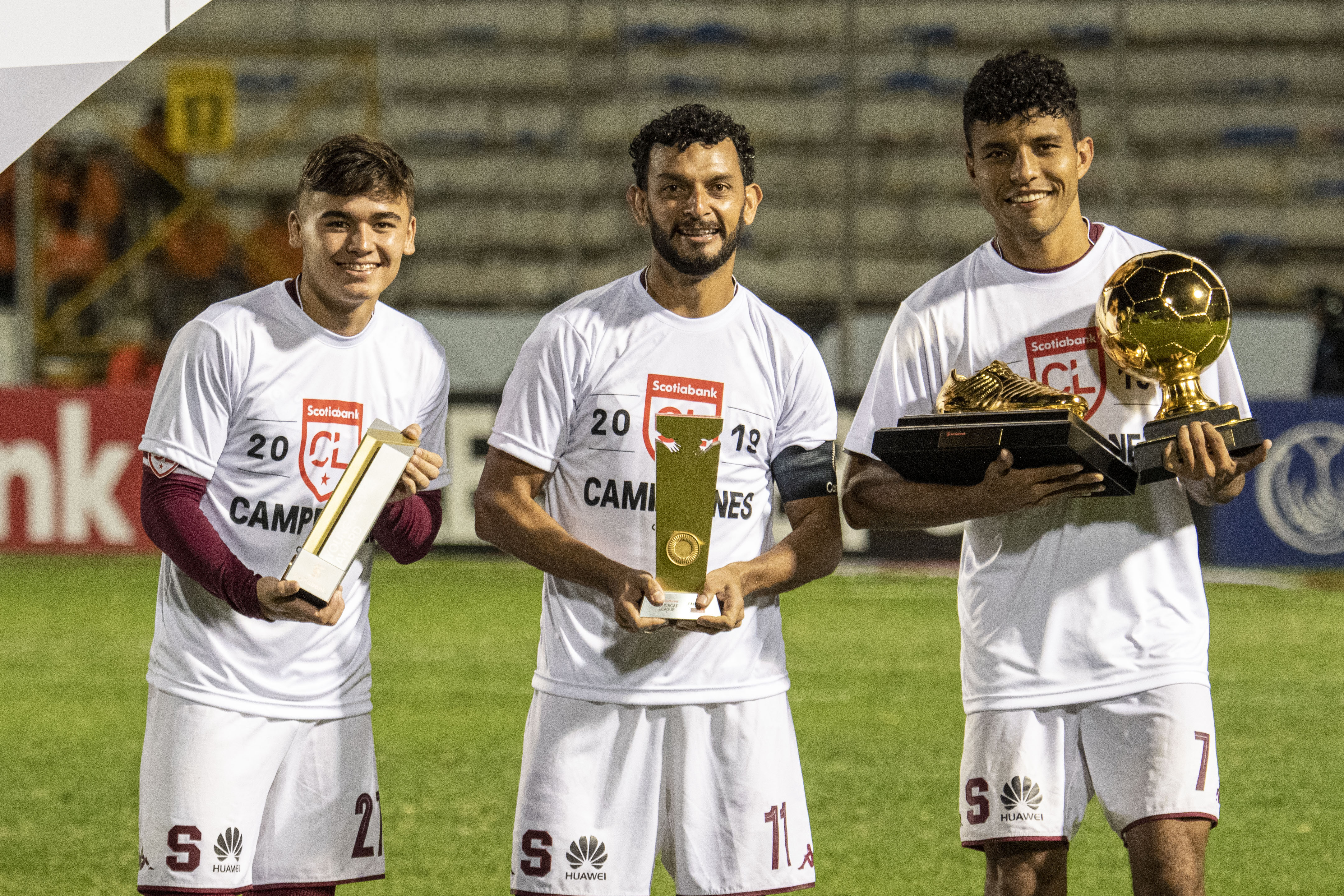 Manfred Ugalde, Michael Barrantes, y Johan Venegas (de izquierda a derecha) posan con los trofeos de Mejor Jugador Joven, Equipo de Fair Play, Goleador del Certamen, y Mejor Jugador, tras ganar la Liga Concacaf.